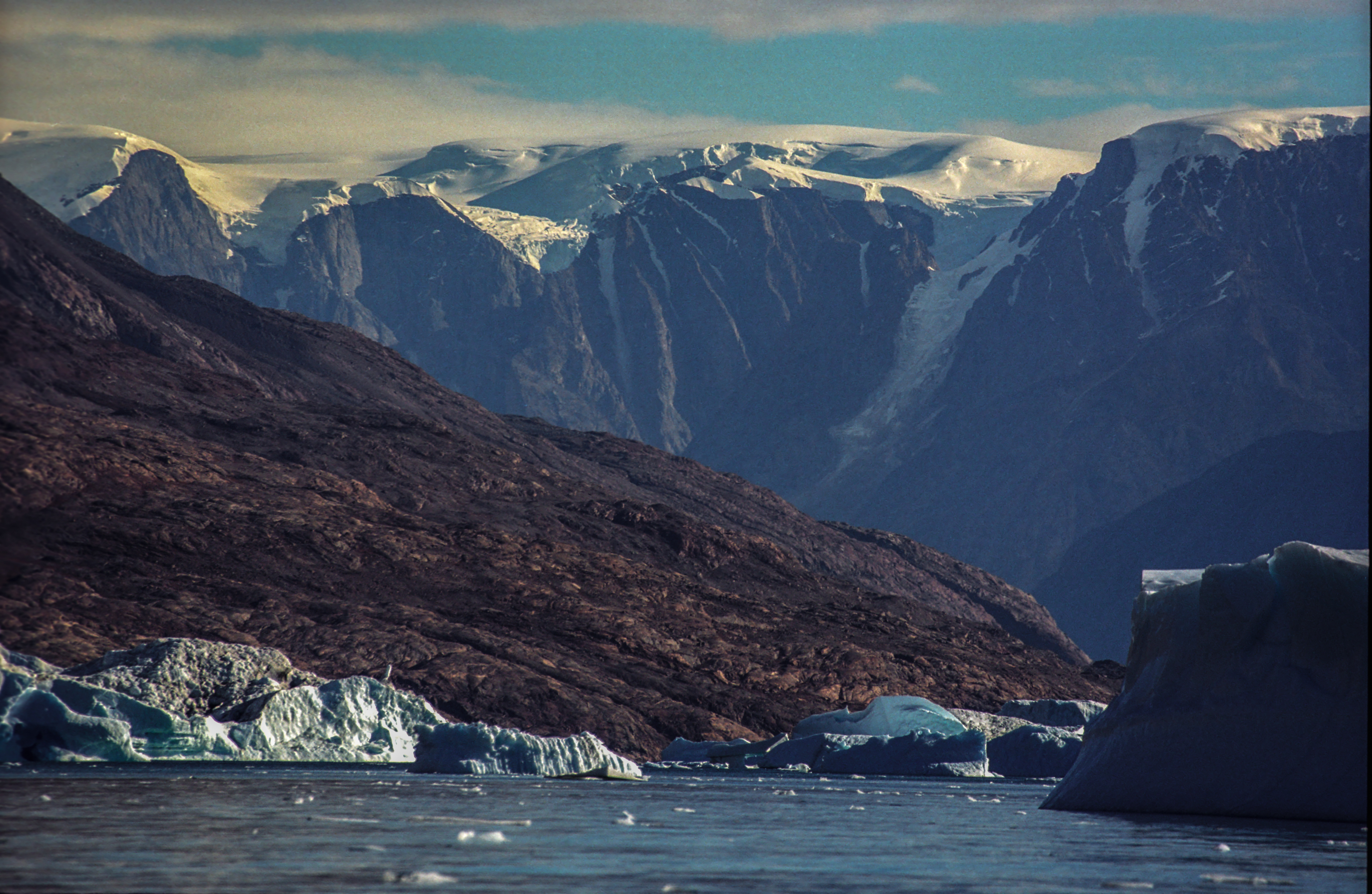 Alpy Stauninga